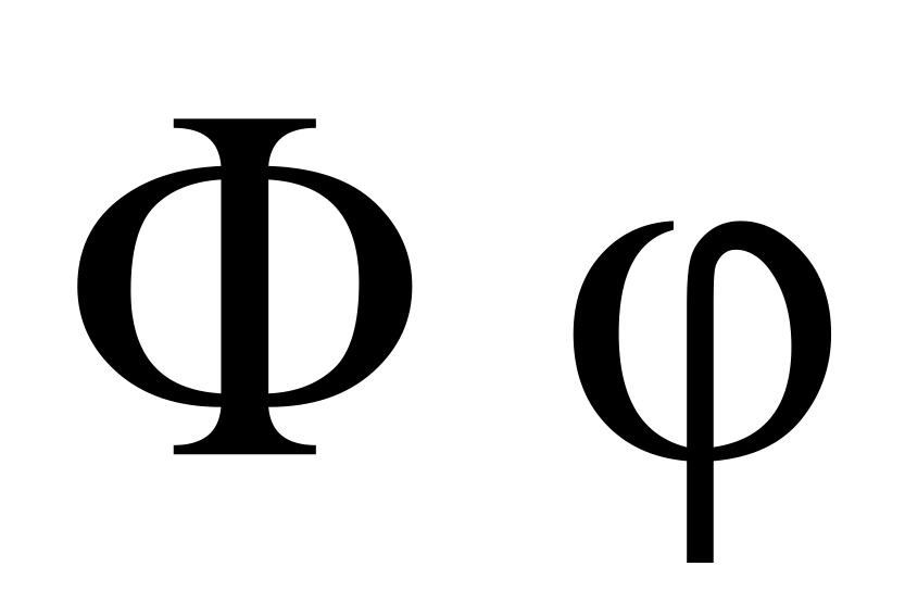 greek letter phi